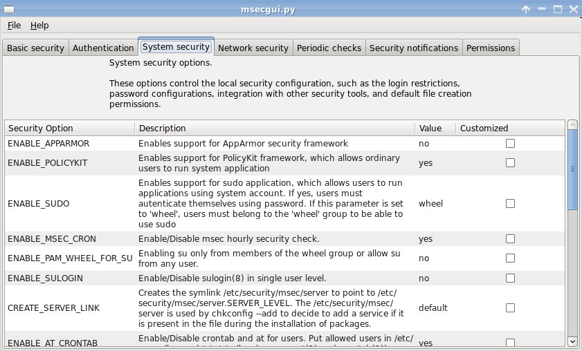 Interface graphique de MSEC sous Mandriva 2009 Spring